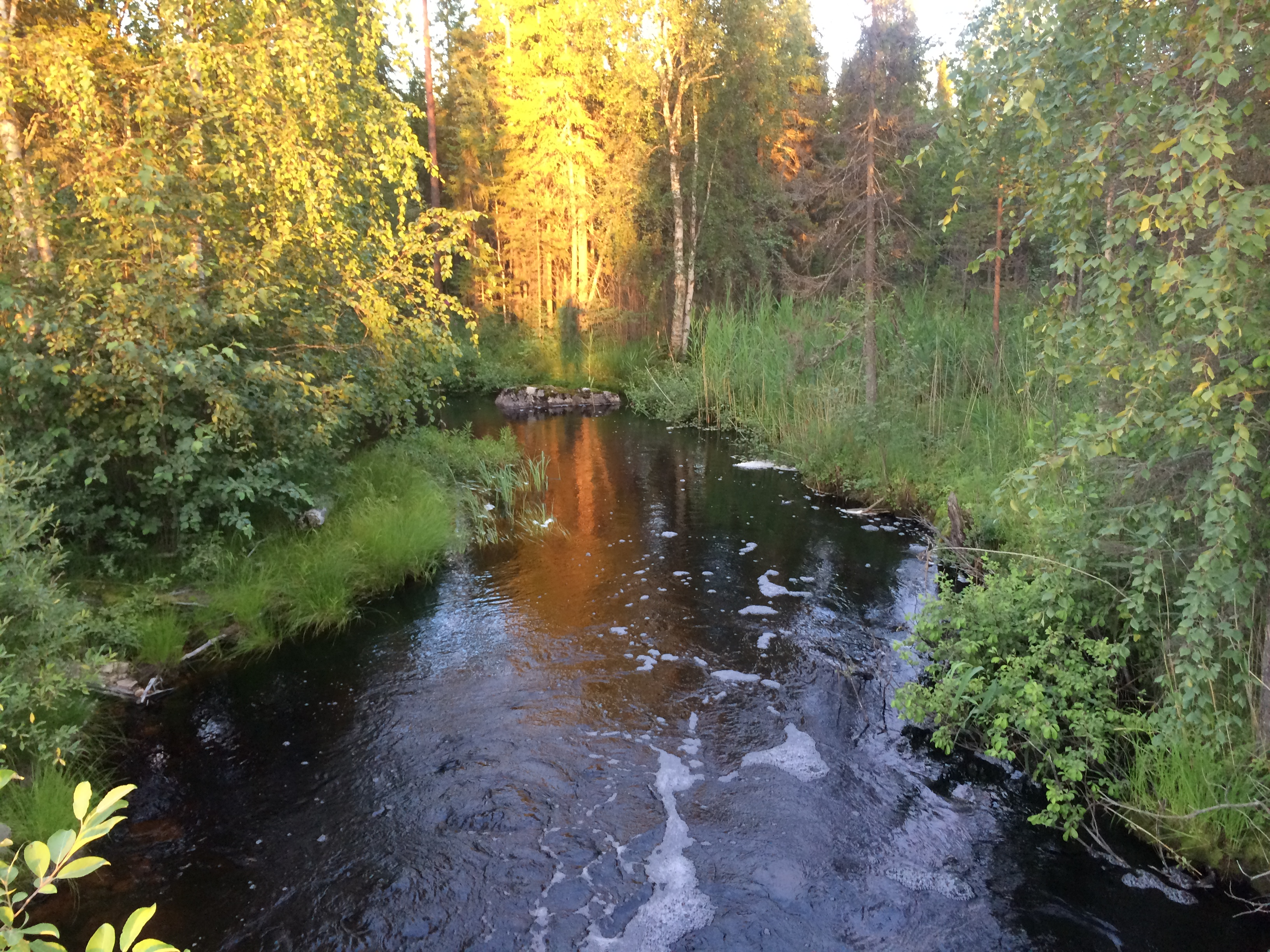 Вайвонец